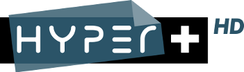 Logo kanału hyper+ HD (2011)